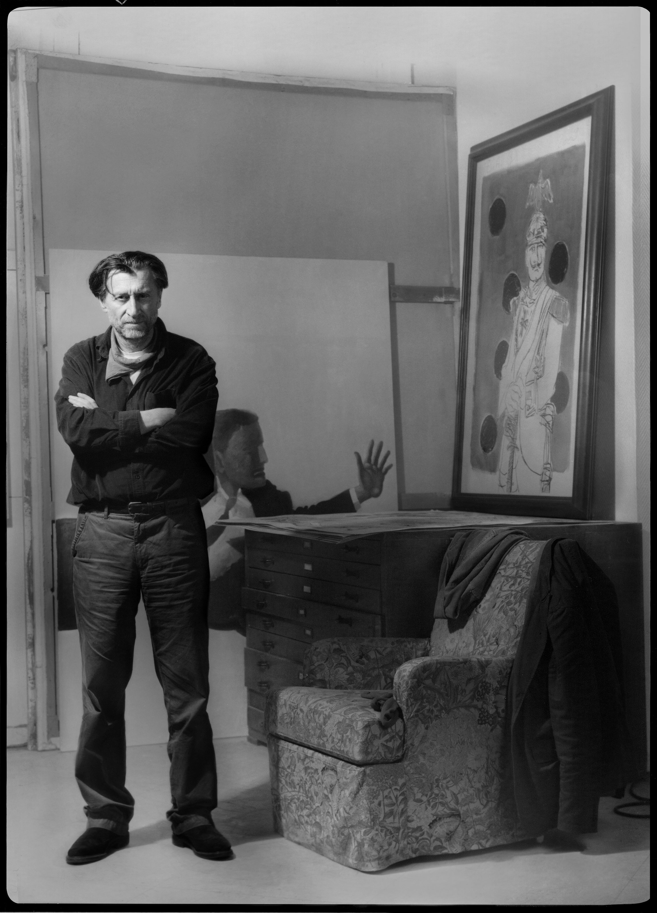 Portrait, Foto von Patrick Pollmeier